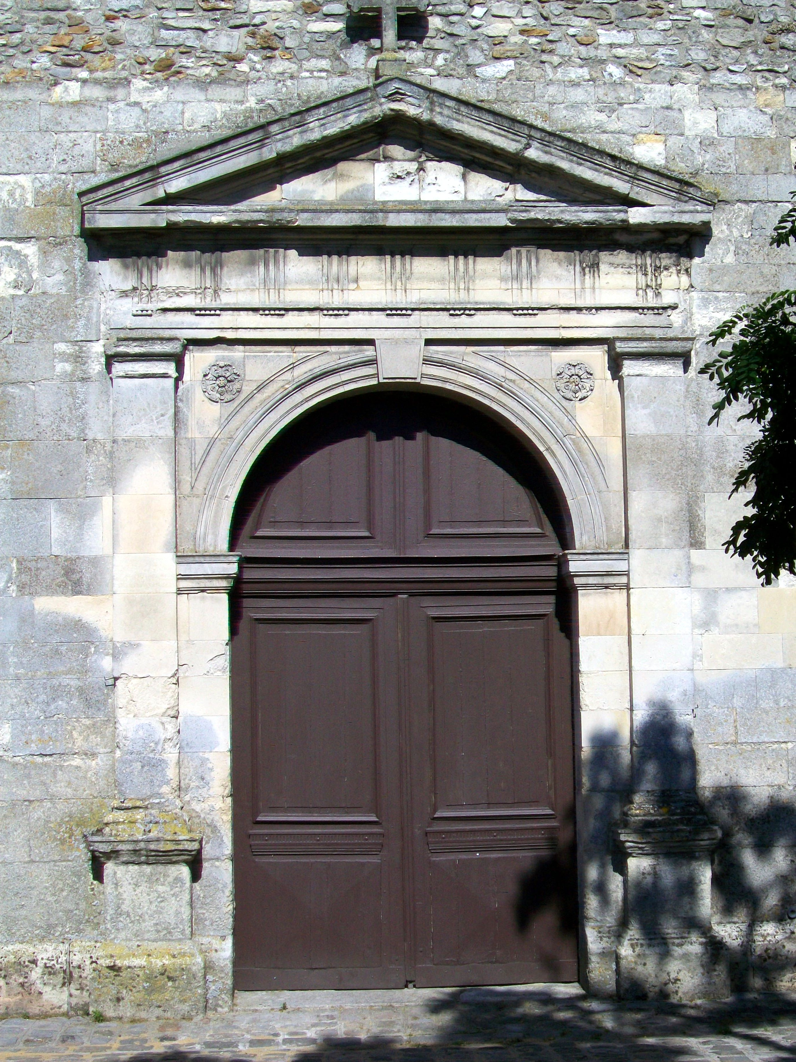 Le portail Renaissance de l'église Saint-Martin.